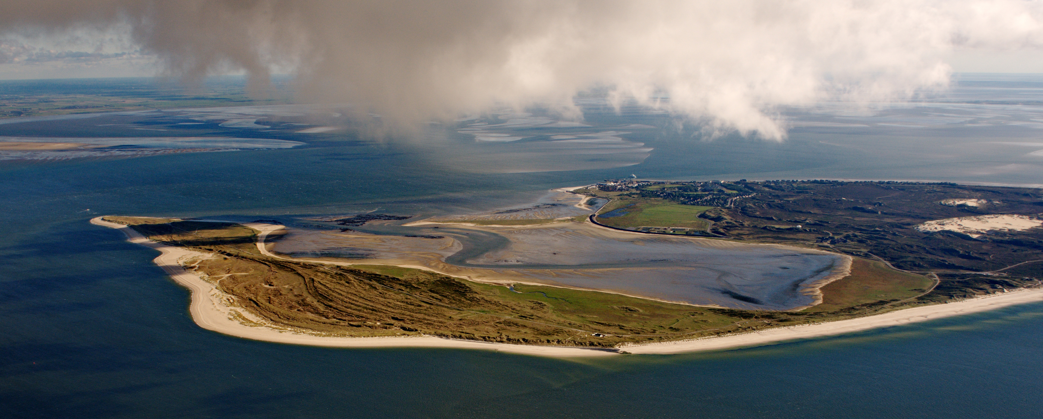 Fotoflug über das nordfriesische Wattenmeer - List auf Sylt (aus NW, hinten) mit Königshafen und Uthörn (Mitte) und Ellenbogen (vorne)